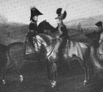 Christian von Zweybrücken (1782–1859, links) und sein Bruder Karl August von Zweybrücken (1784–1812, rechts)